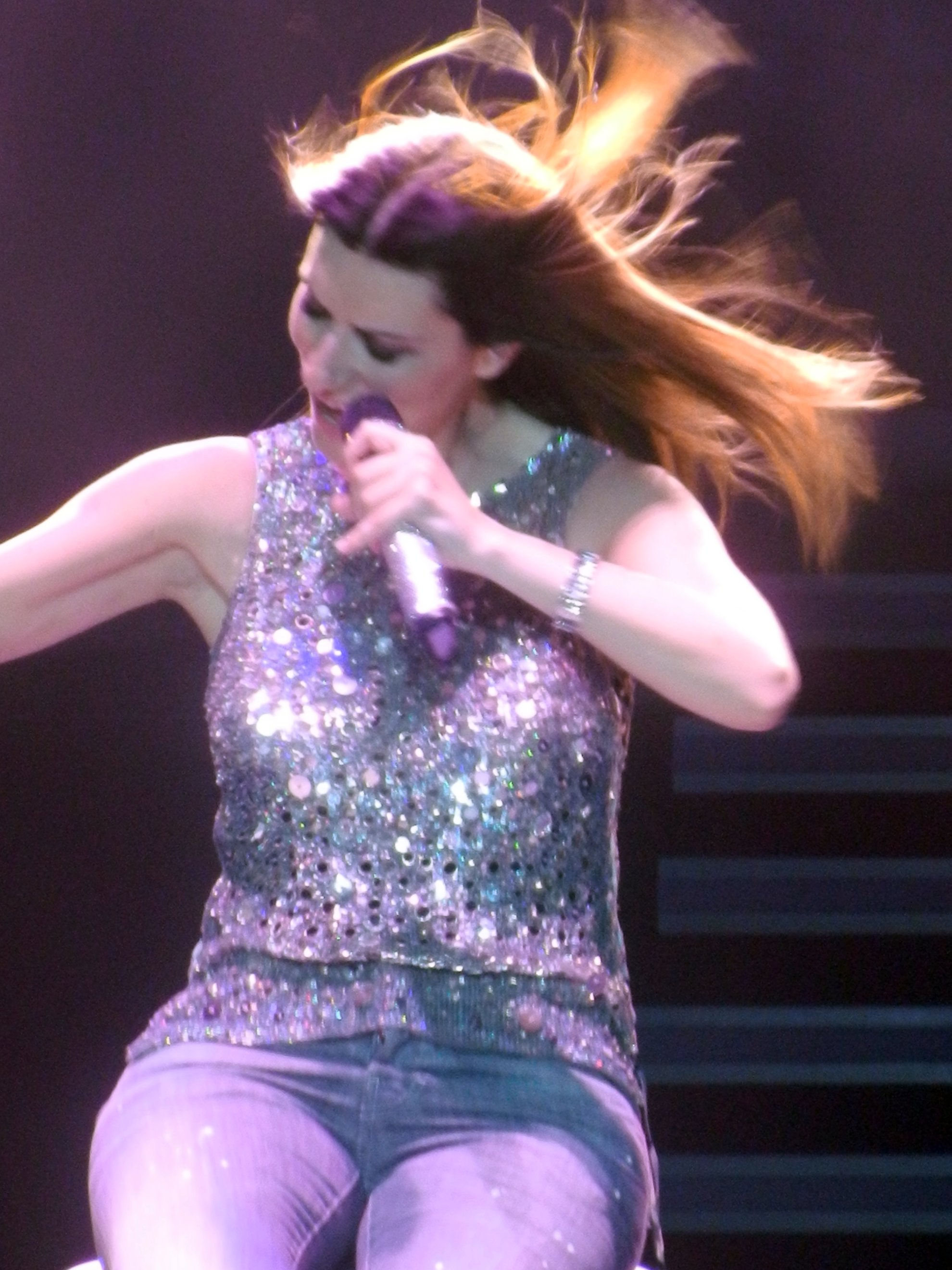 Laura Pausini 22 - Bercy - Avril 2012